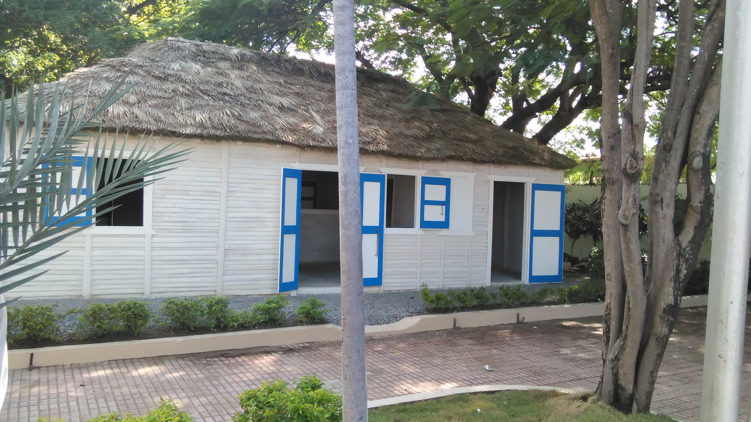 réplica de la casa materna de Máximo Gómez, Baní, República Dominicana.